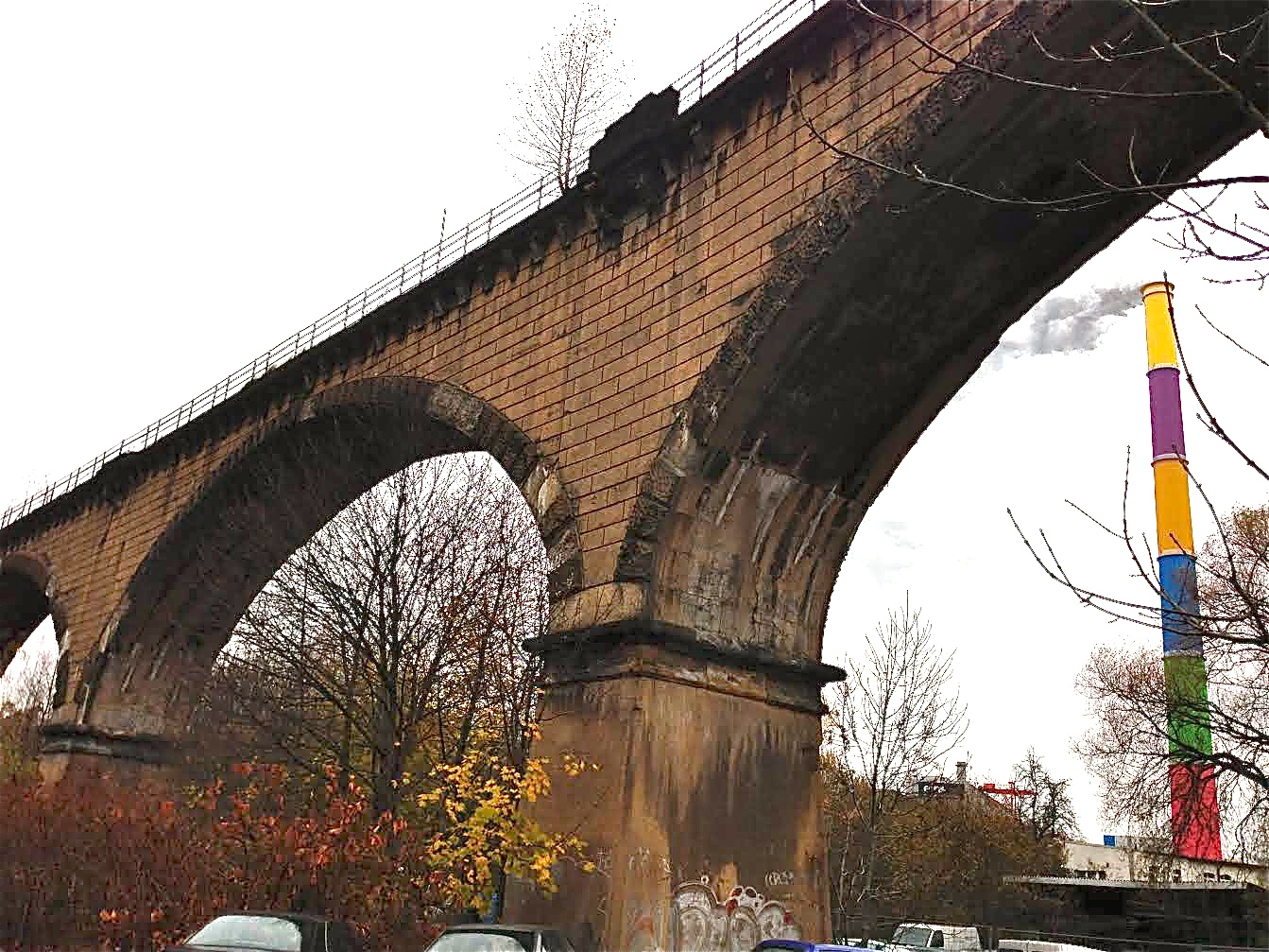 Bauwerke Sachsens, Chemnitztalviadukt, Denkmalschutz, Bogenbrücke, Benita Martin, Malerin, Fotografin